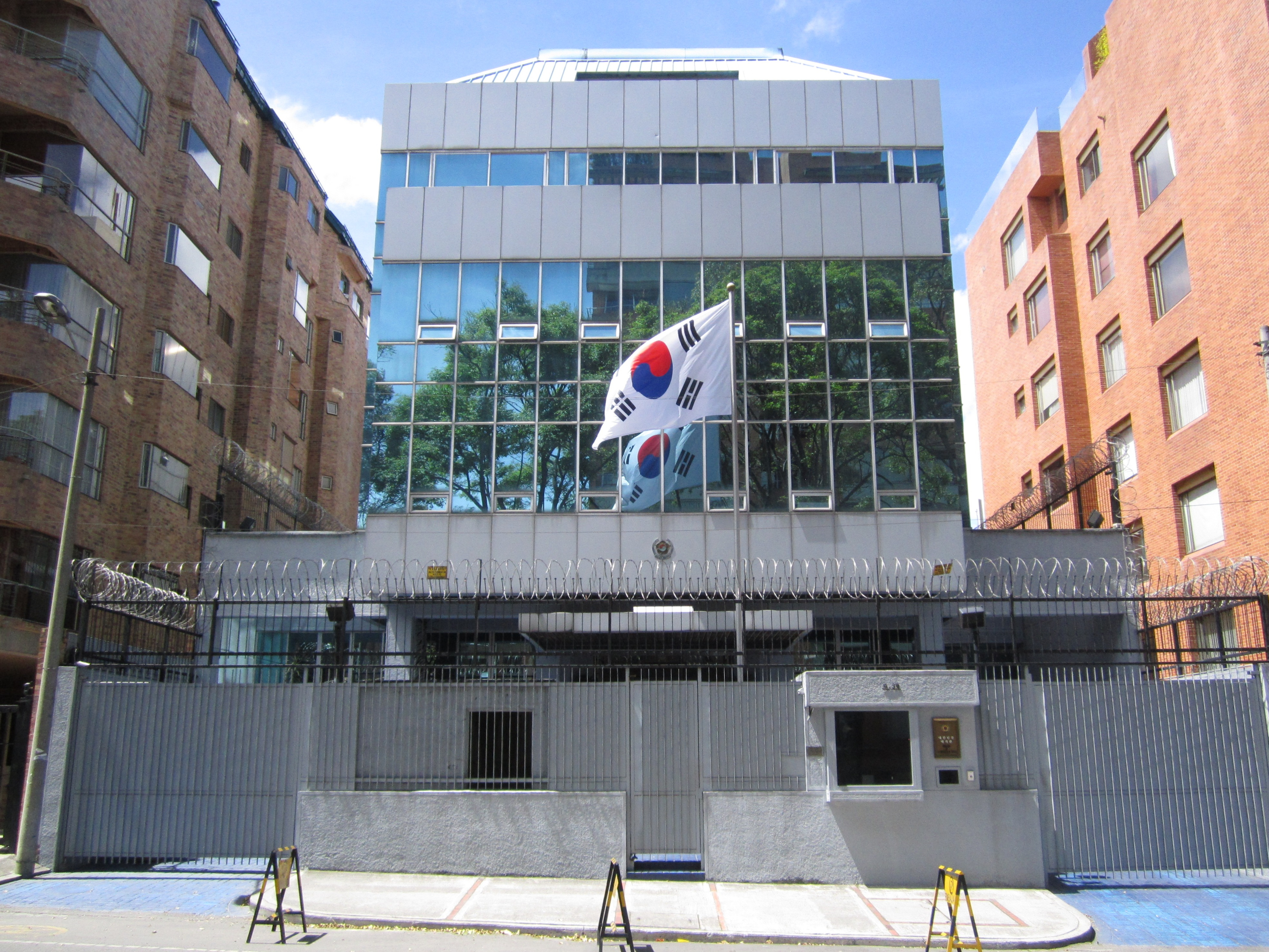 Bogotá embajada de Corea del Sur